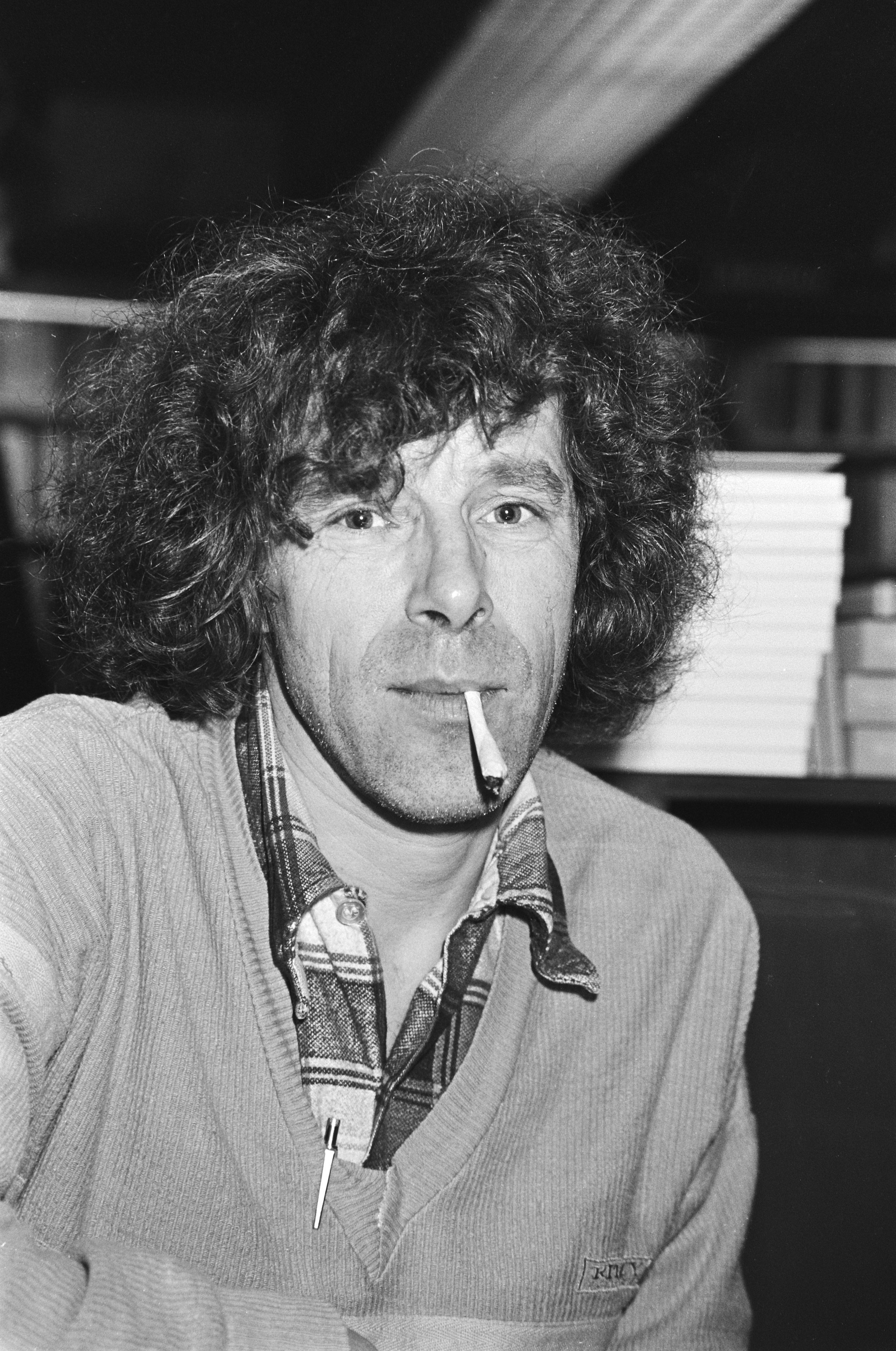 Collectie / Archief : Fotocollectie Anefo Reportage / Serie : [ onbekend ] Beschrijving : Portret van tekenaar Peter Vos Datum : 9 februari 1981 Trefwoorden : boeken, kleding, mannen, portretten, roken, shag Persoonsnaam : Vos, Peter Fotograaf : Dijk, Hans van / Anefo, [onbekend] Auteursrechthebbende : Nationaal Archief Materiaalsoort : Negatief (zwart/wit) Nummer archiefinventaris : bekijk toegang 2.24.01.05 Bestanddeelnummer : 931-3093